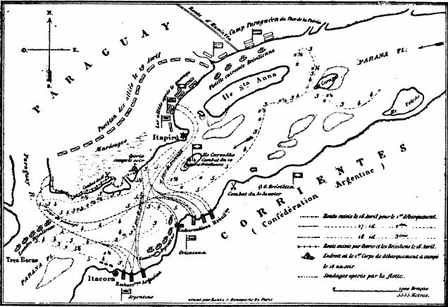 Carte indiquant la position de l'escadre alliée et la marche de la colonne du général Osorio. - (Opérations des 16, 17 et 18 avril 1866).